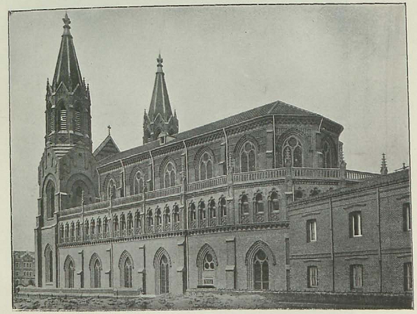 Fotografía de la fachada oriental de la iglesia de San Vicente de Paul o de la Milagrosa, recogida en la revista española Arquitectura y Construcción.